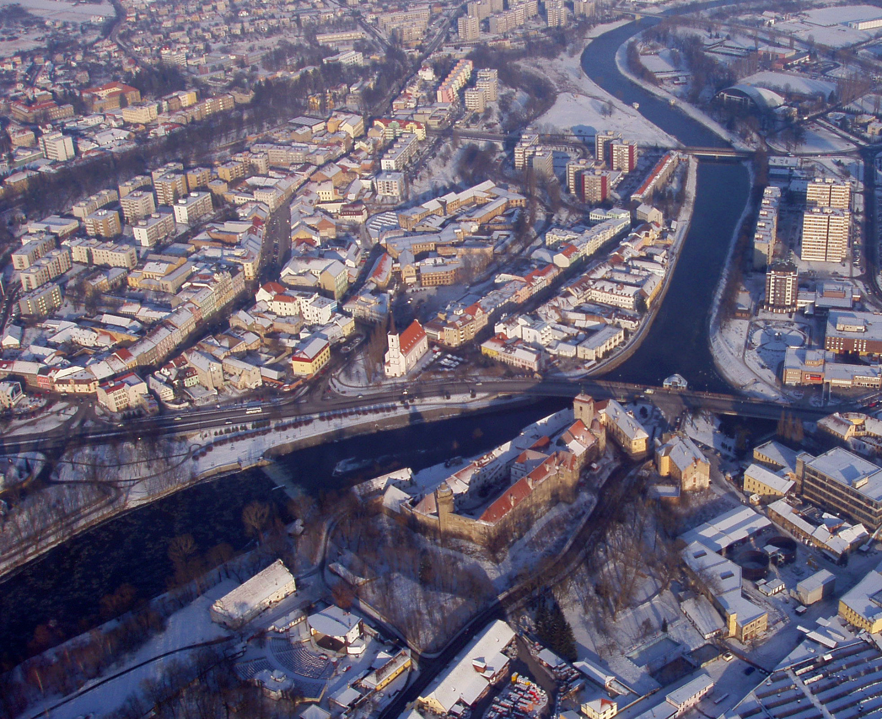 Letecký pohled na střed Strakonic se soutokem Otavy (zleva) a Volyňky (zprava). V popředí hrad a zámek, sídlo Muzea středního Pootaví, s kostelem sv. Prokopa. Vlevo od hradu za řekou kostel sv. Markéty.